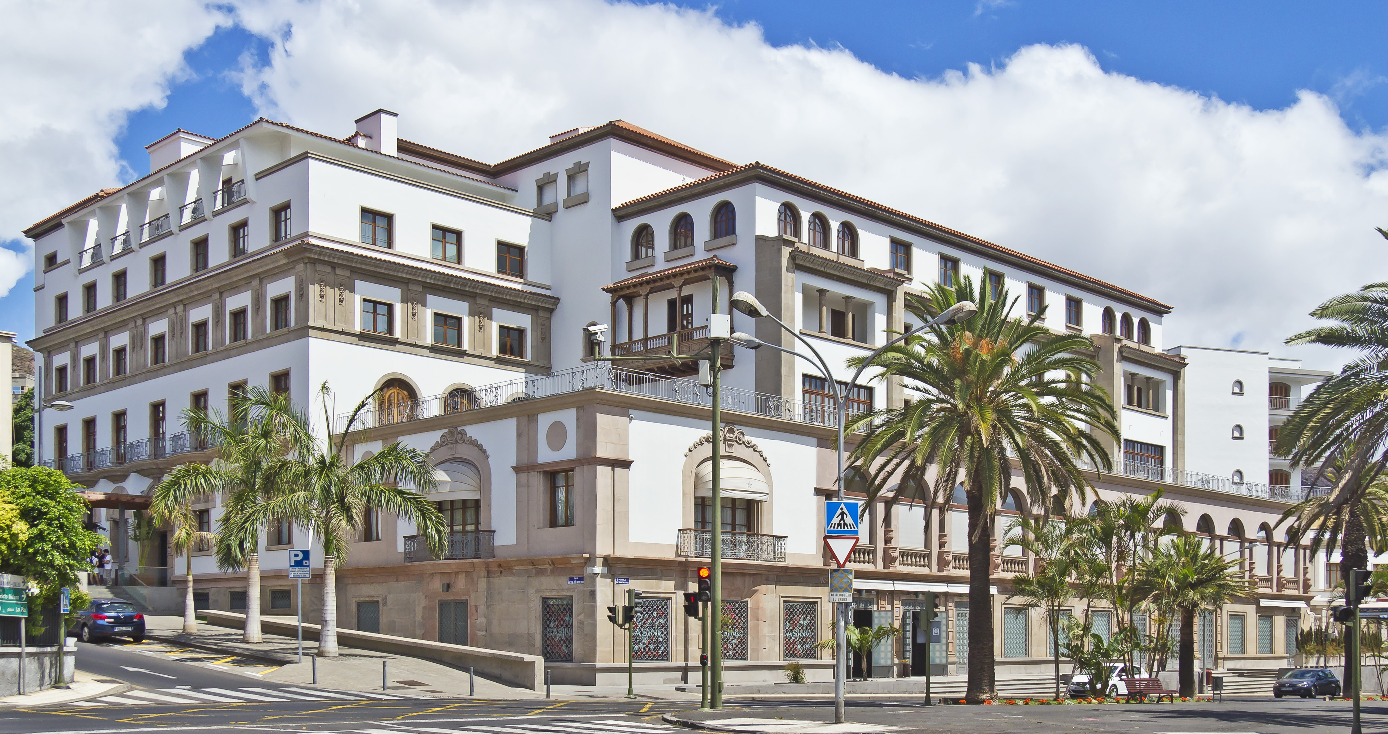 Das Hotel Mencey wurde im Jahr 1945 von dem Architekten Enrique Rumeu de Armas entworfen. Es wurde seitdem verschiedentlich verändert.